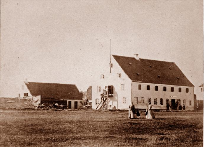 Købmandsgården Carlshaab i Hadsund.